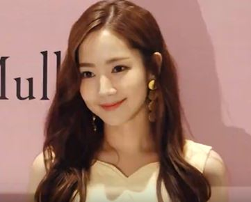 디스패치 구독 클릭! Dispatch Subscribe